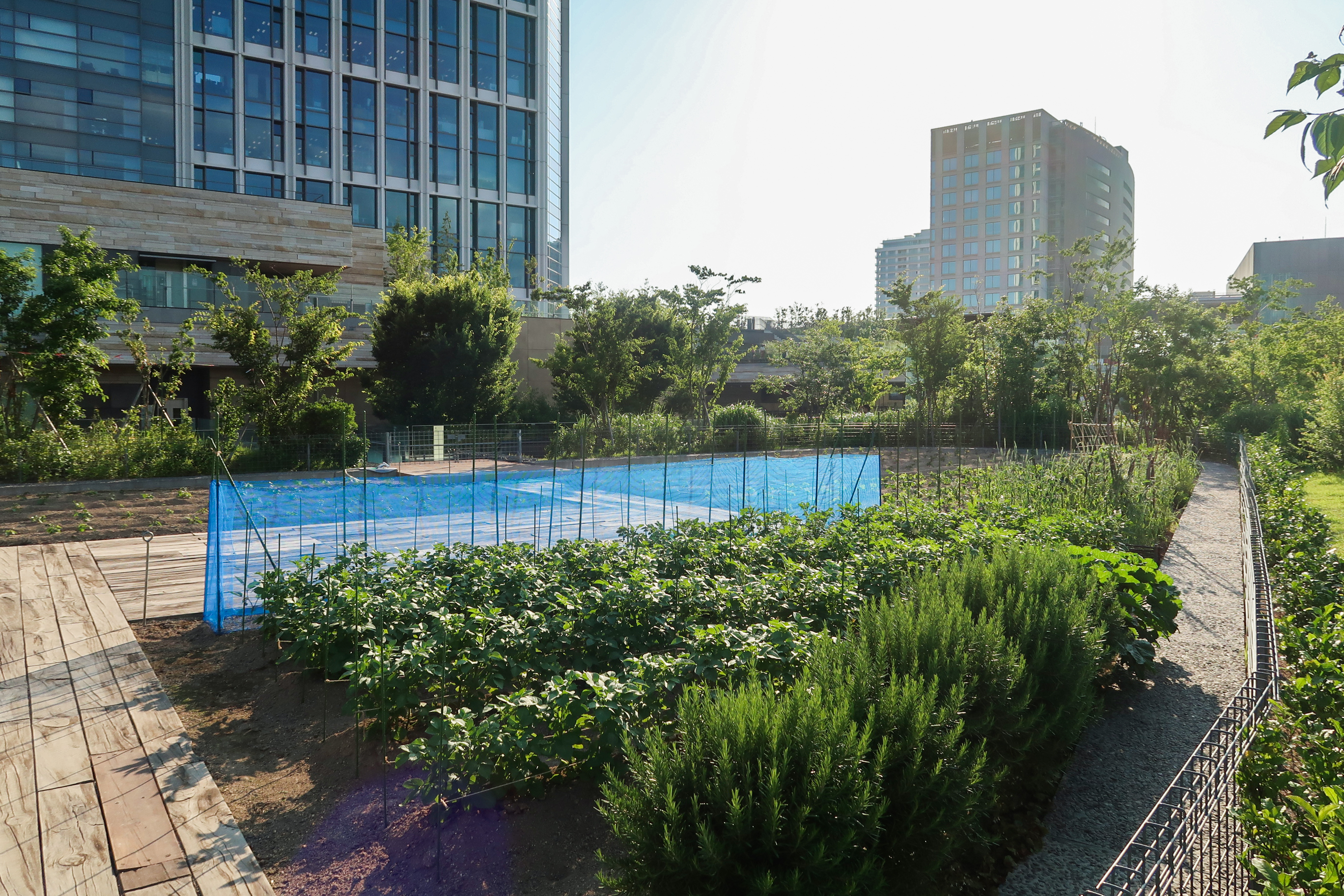 Futako-Tamagawa Rise Shopping Center Level 3 Vegetable Garden